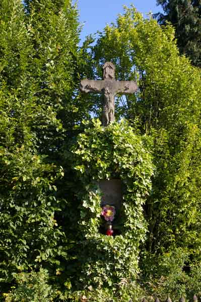 Wegkreuz an der Virneburgstraße